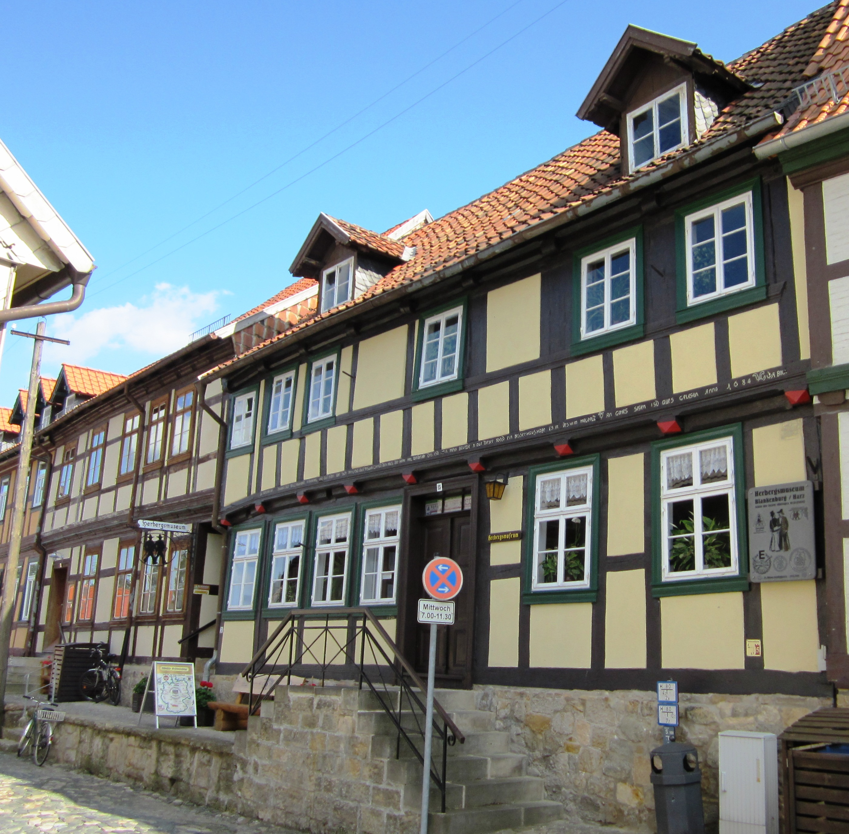 Das Herbergsmuseum in der Bergstraße von Blankenburg im Harz